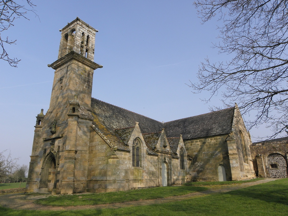 Façade occidentale et flanc sud de la chapelle Saint-Sébastien en Saint-Ségal (29). .